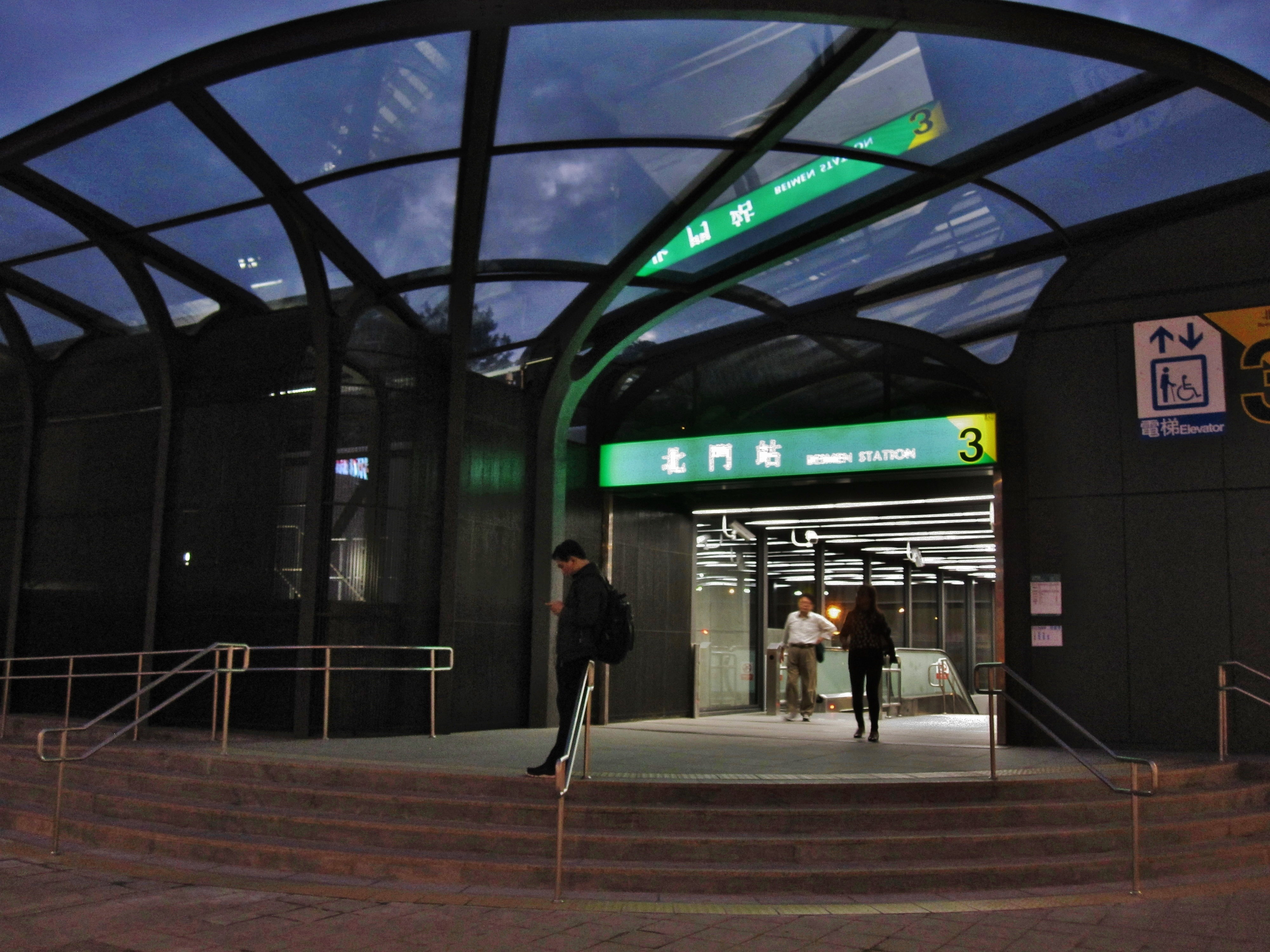 中文（台灣）: 台北捷運北門站3號出口夜景。